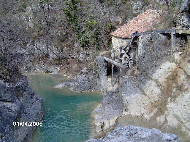 kotli, croatia